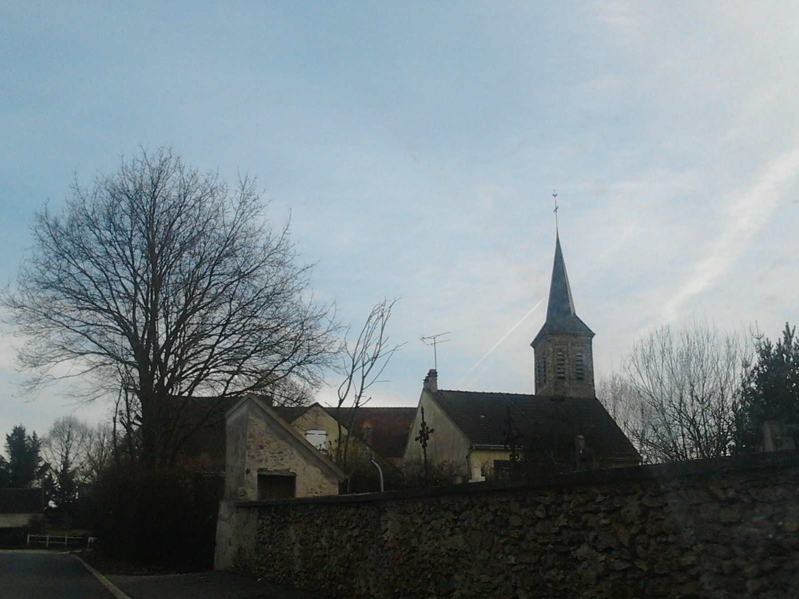 Église de Saint-Denis-lès-Rebais (Seine-et-Marne, France).